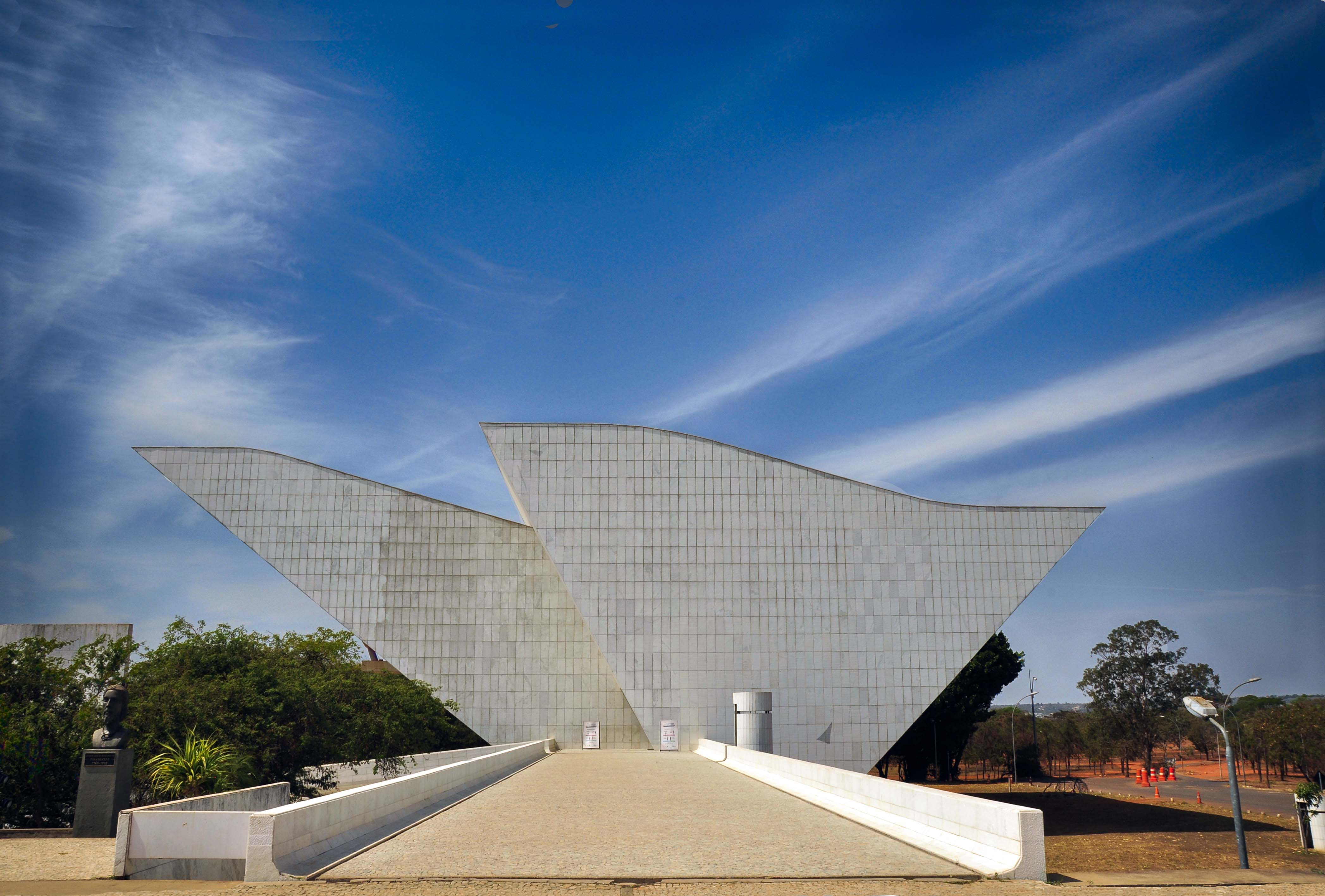 Panteão da Pátria localizado na Praça dos Três Poderes